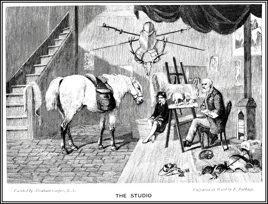 Студия Абрахама Купера